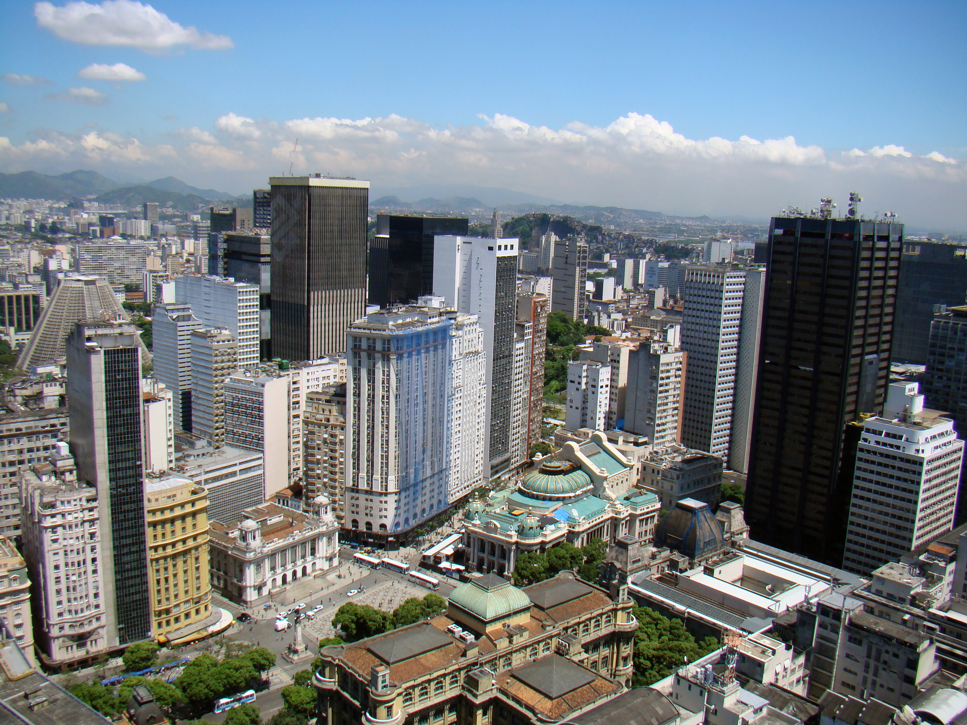 O Centro é um bairro da Região Central da cidade do Rio de Janeiro